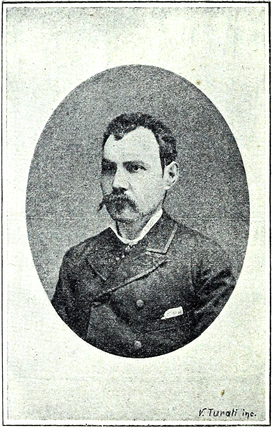 Illustrazioni da I monumenti e le opere d'arte della città di Benevento: lavoro storico, artistico, critico, di Almerico Meomartini, Tipografia di L. de Martini e figlio, Benevento, 1889